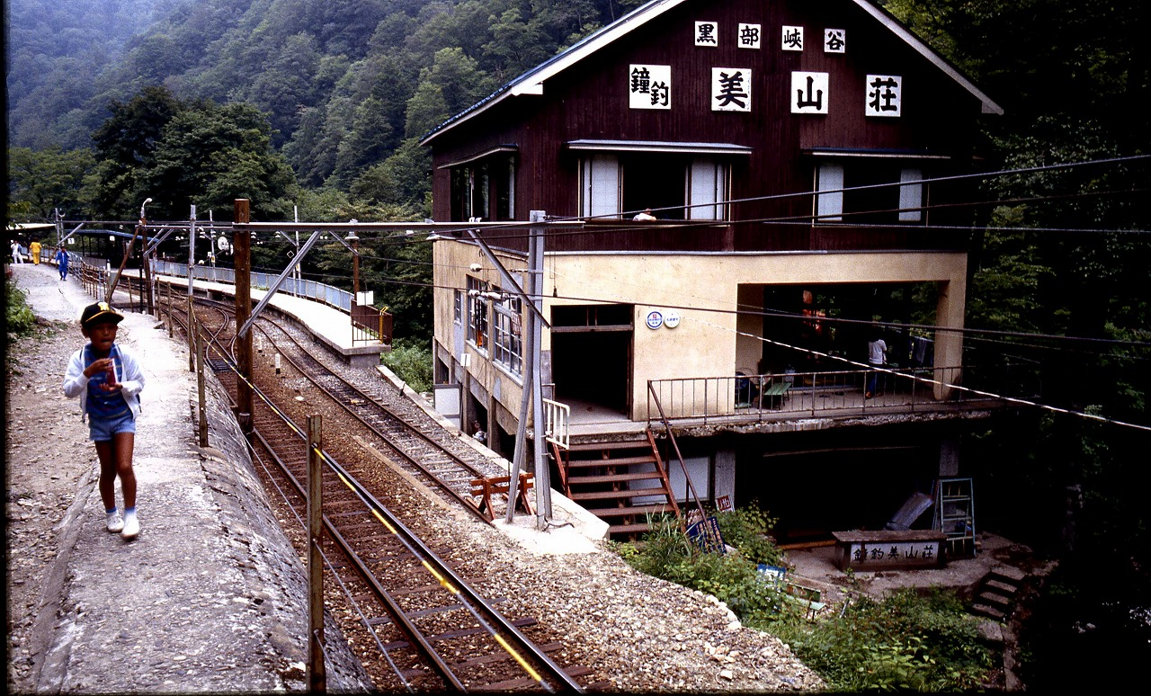 鐘釣温泉